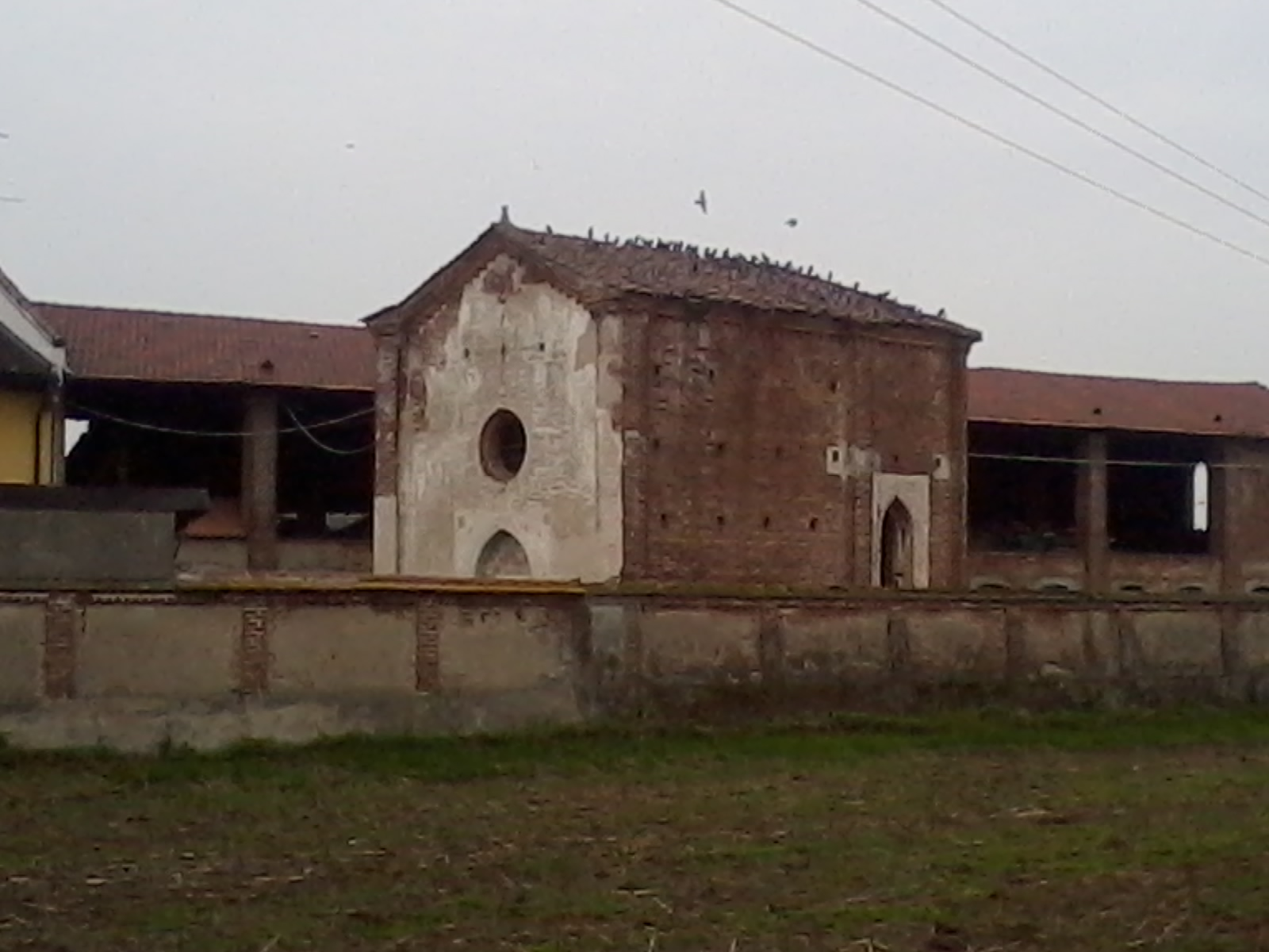 L'Oratorio della Beata Vergine Maria presso la Cascina di Donato Dal Conte, Gaggiano (MI) - Italy